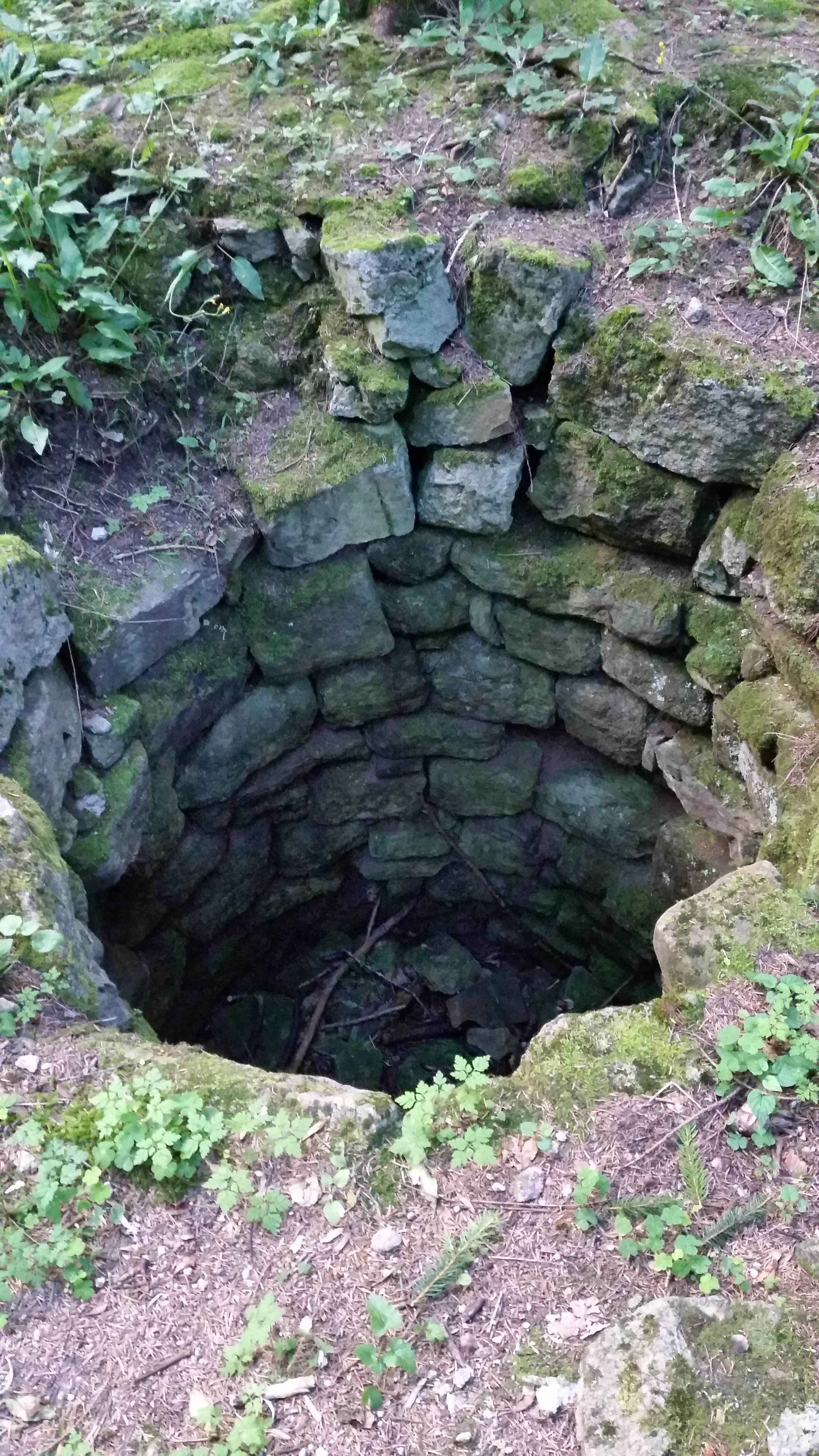 Burg Rotenzimmern, Brunnen